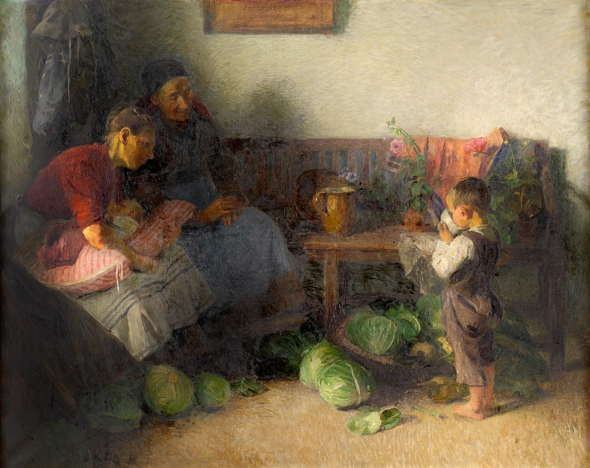 Eine glückliche Familie.